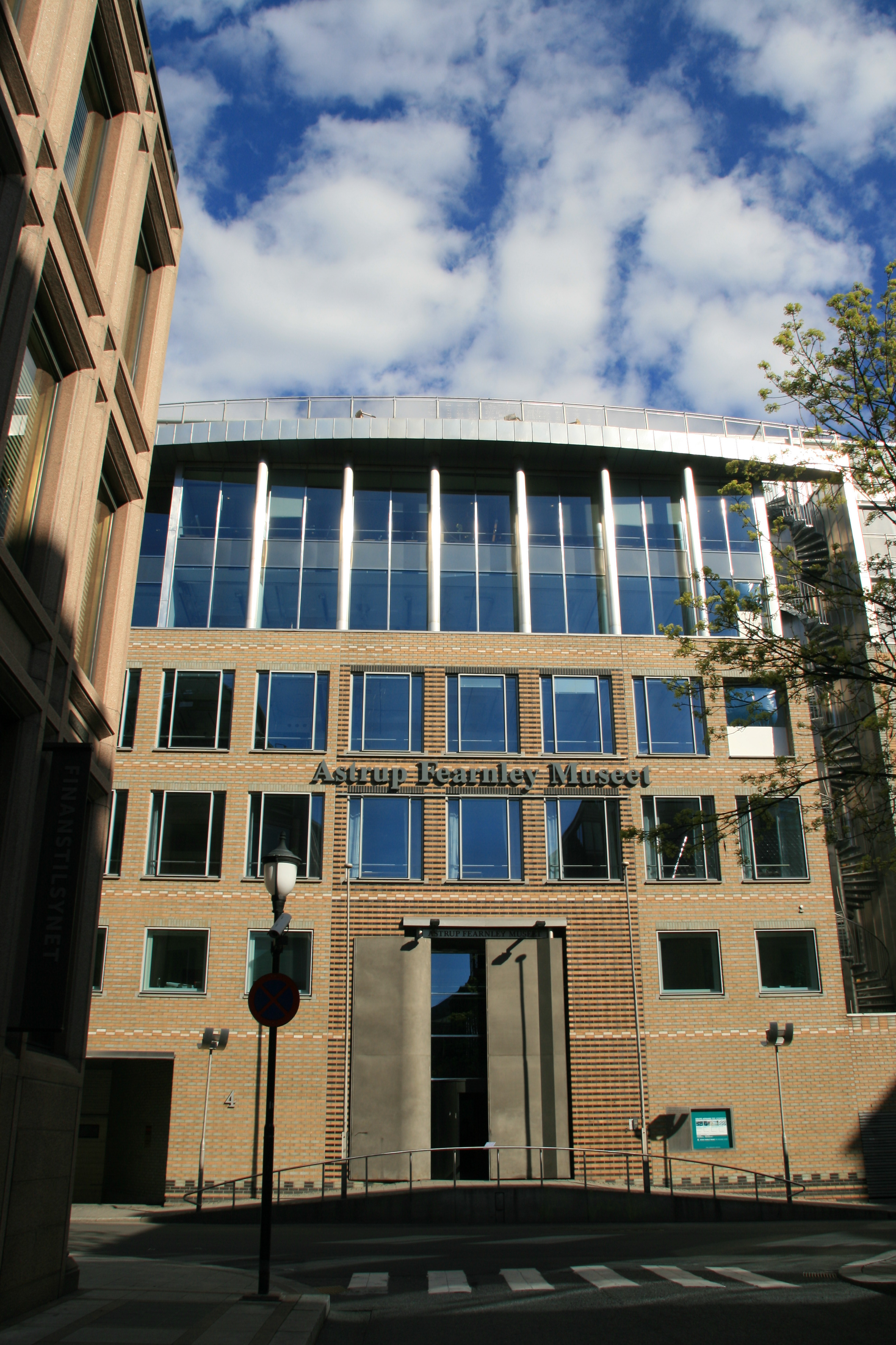 Astrup Fearnley Museet for Moderne Kunst, Oslo.